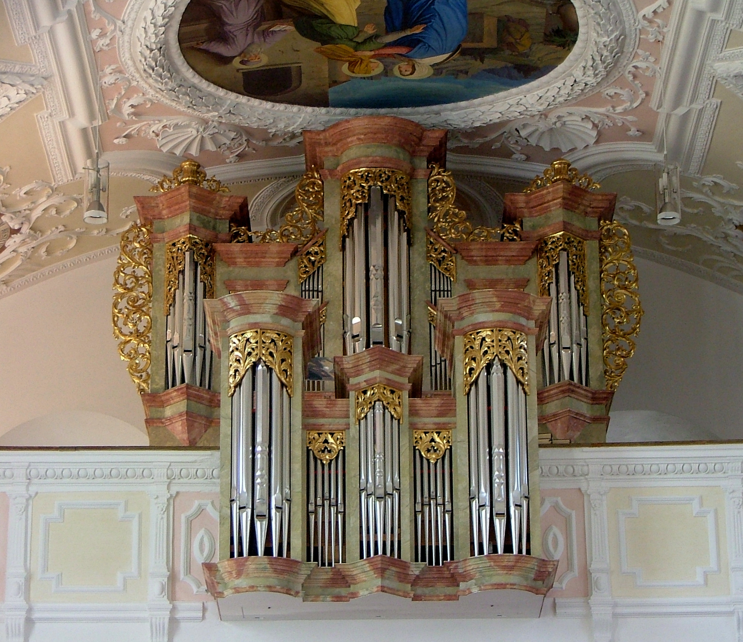 Orgel